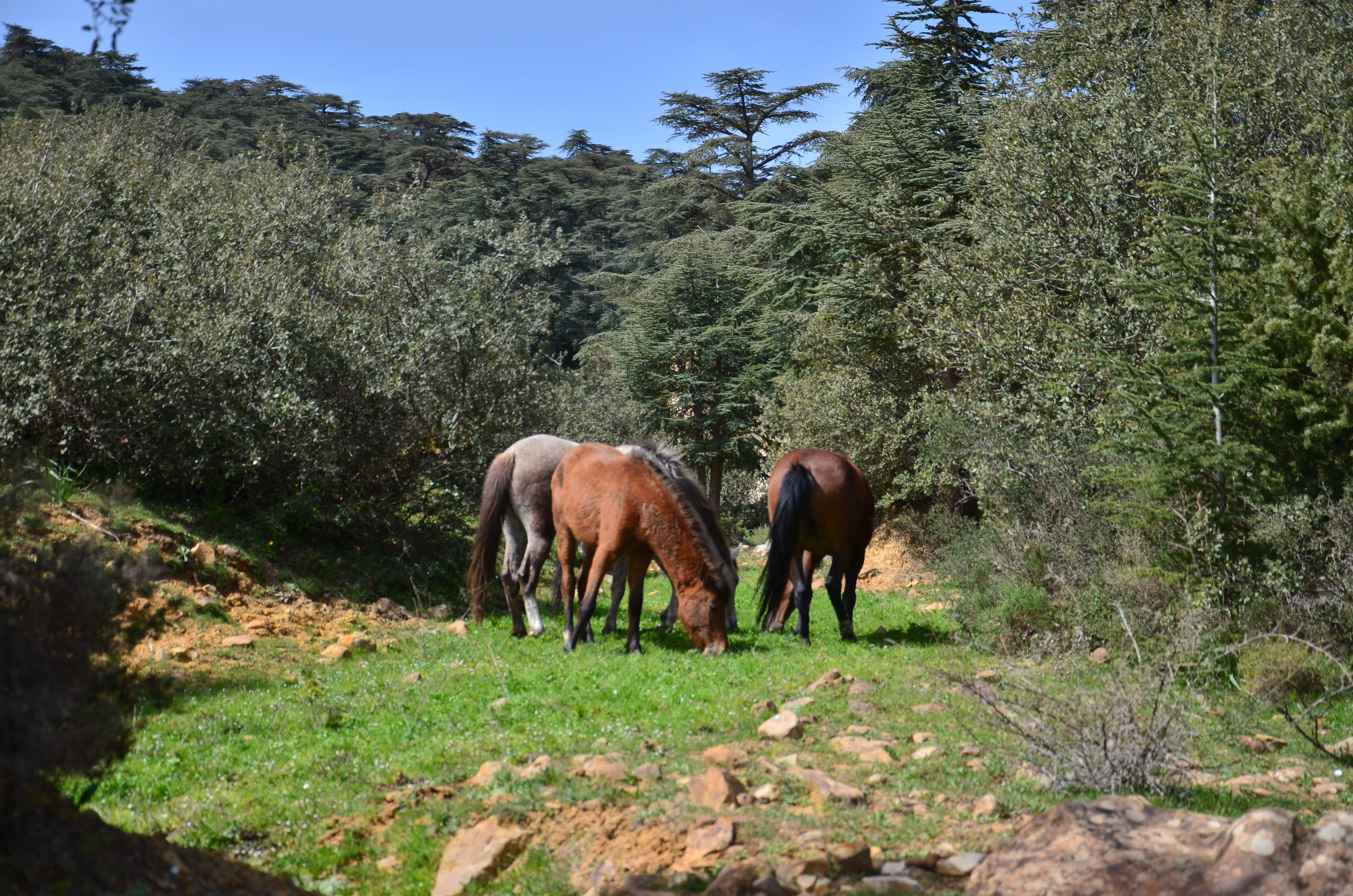 La foret des cèdres de Theniet el had (Ouarsenis)